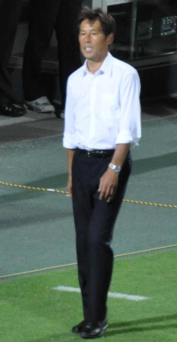 Akira Nishino, Gamba Osaka manager, 2011.07.10 Omiya Ardija 2-3 Gamba Osaka_309